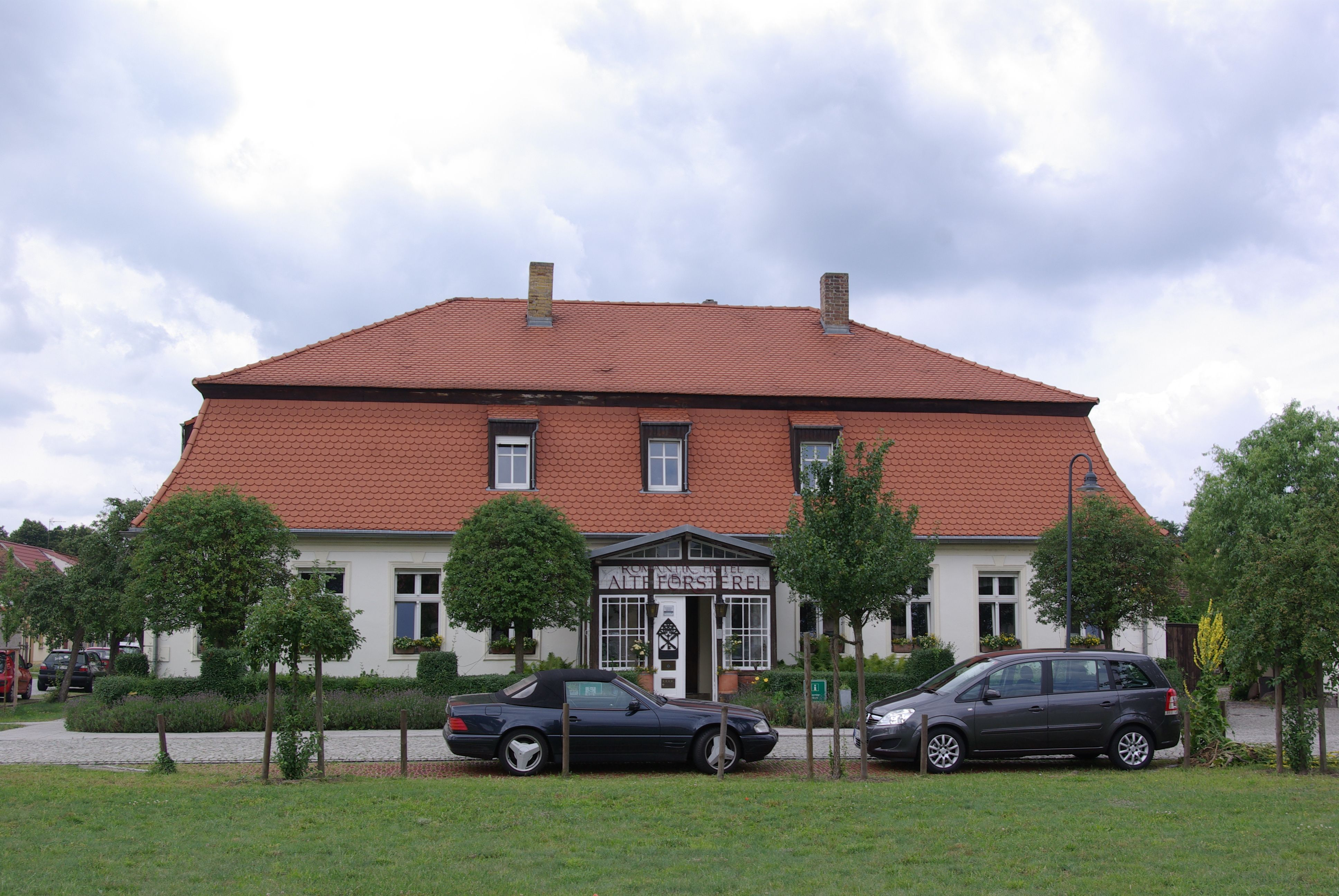 Jüterbog, Ortsteil Kloster Zinna in Brandenburg. Das Haus Markt 7 ist die alte Oberförsterei und steht unter Denkmalschutz. Das Haus war und ist ein Hotel.